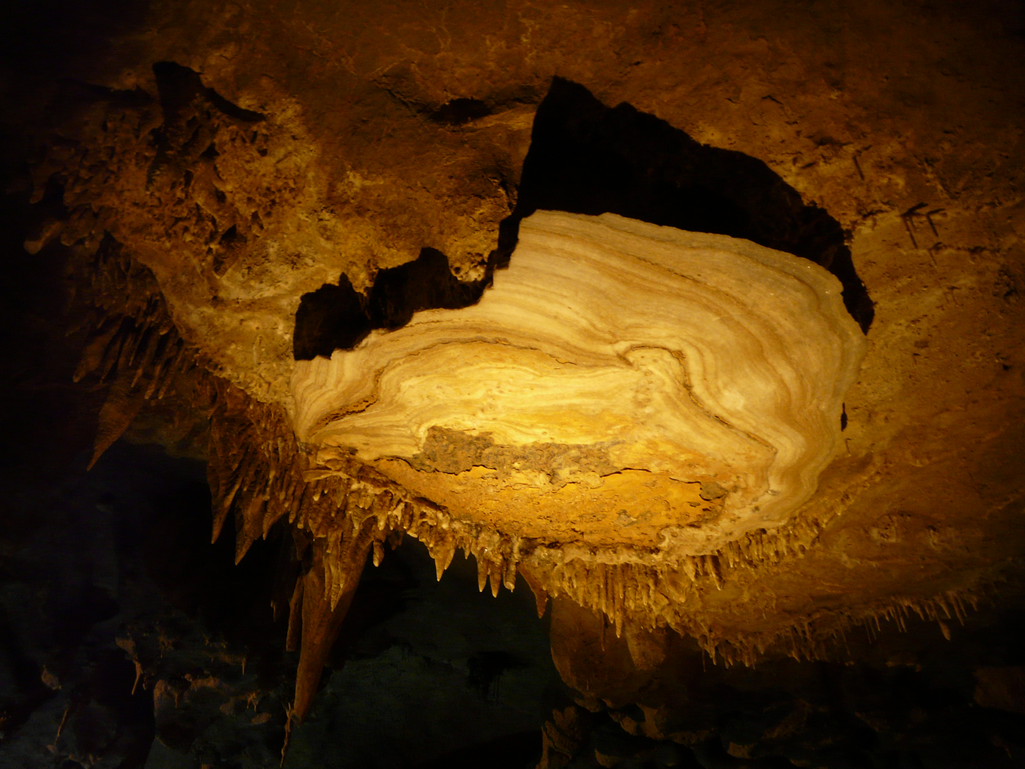 L'intérieur des grottes de Bétharram.